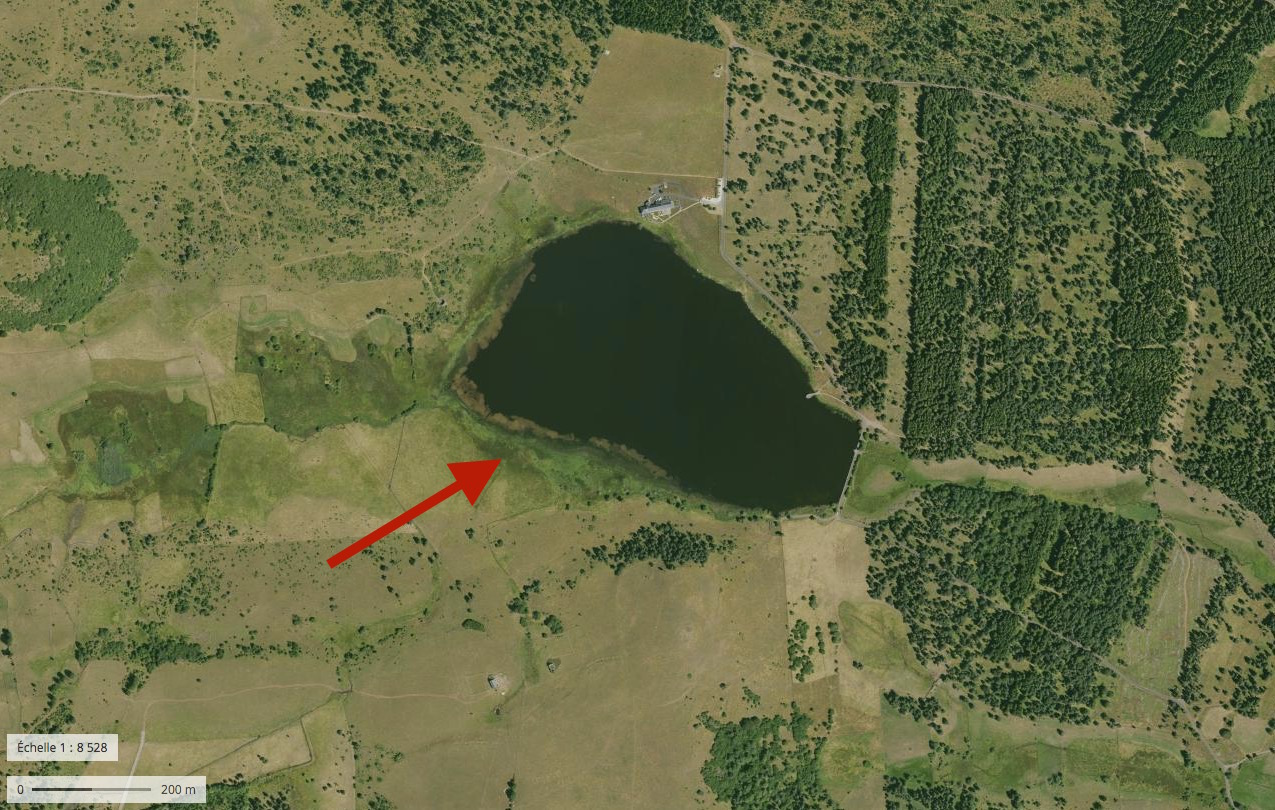 Photographie aérienne de 2019 centrée sur le Lac du Pêcher © IGN